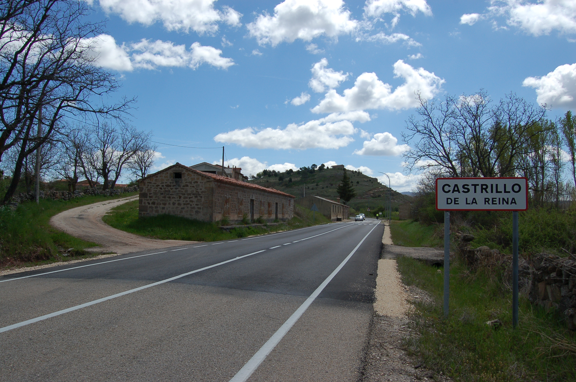 Entrada a Castrillo de la Reina por la carretera CL-117